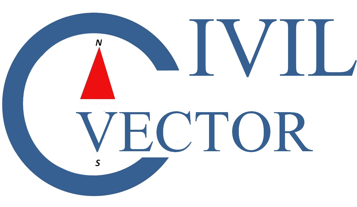 სამოქალაქო ვექტორის ლოგო